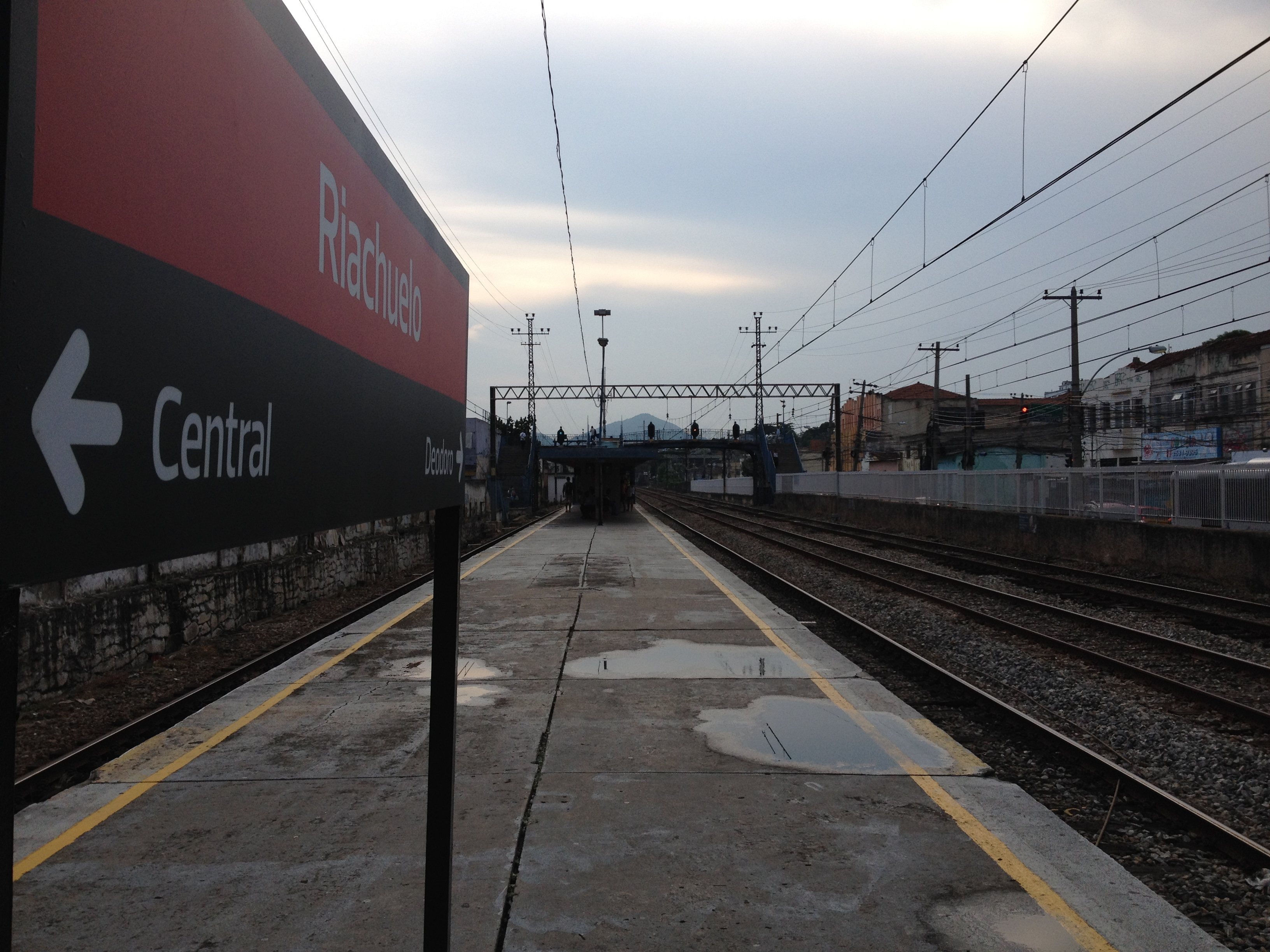 Estação Riachuelo